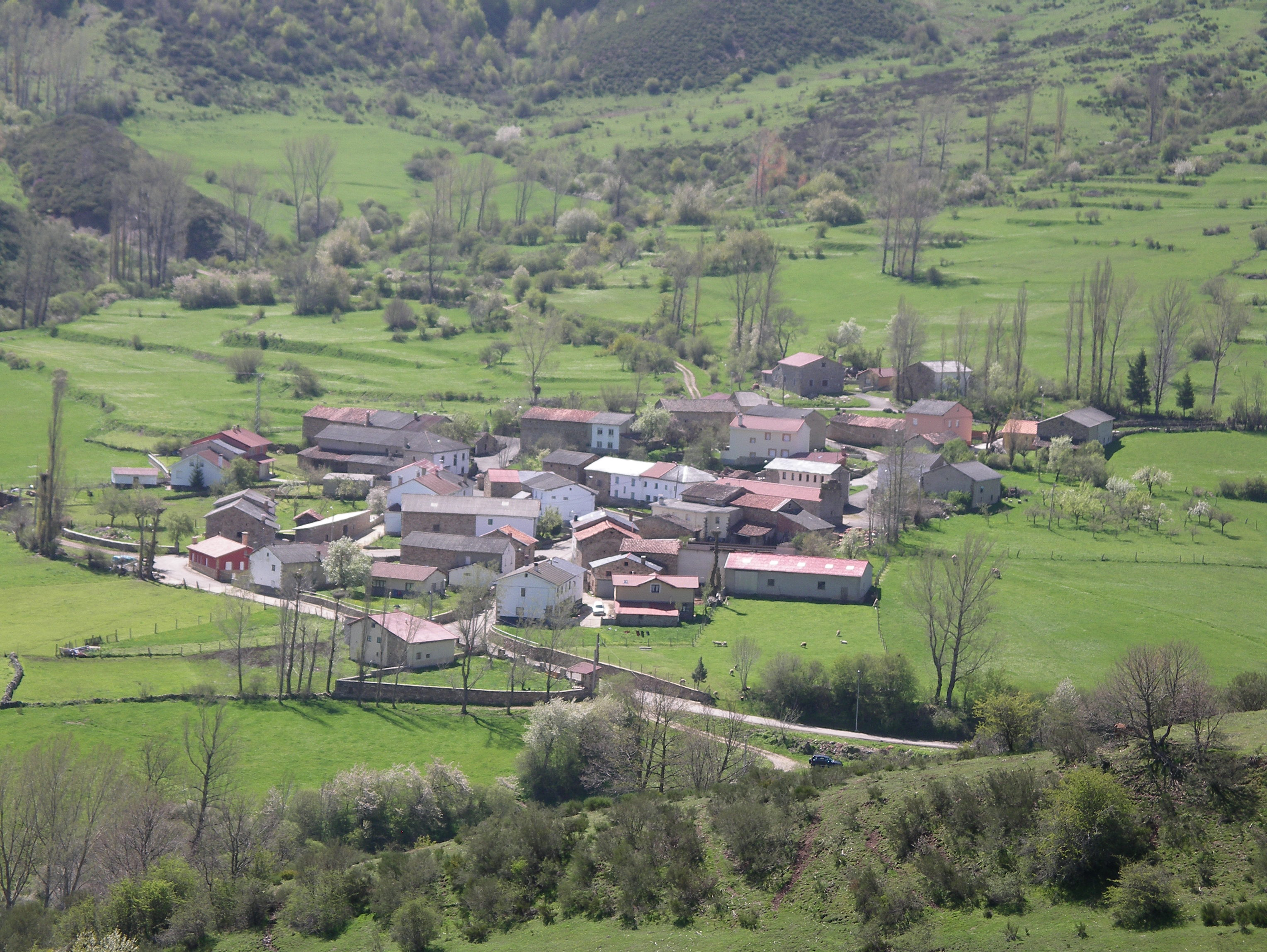 Imagen del pueblo de Carande, situado en la montaña oriental leonsa, pertenece al Ayto. de Riaño. (Provincia de León)